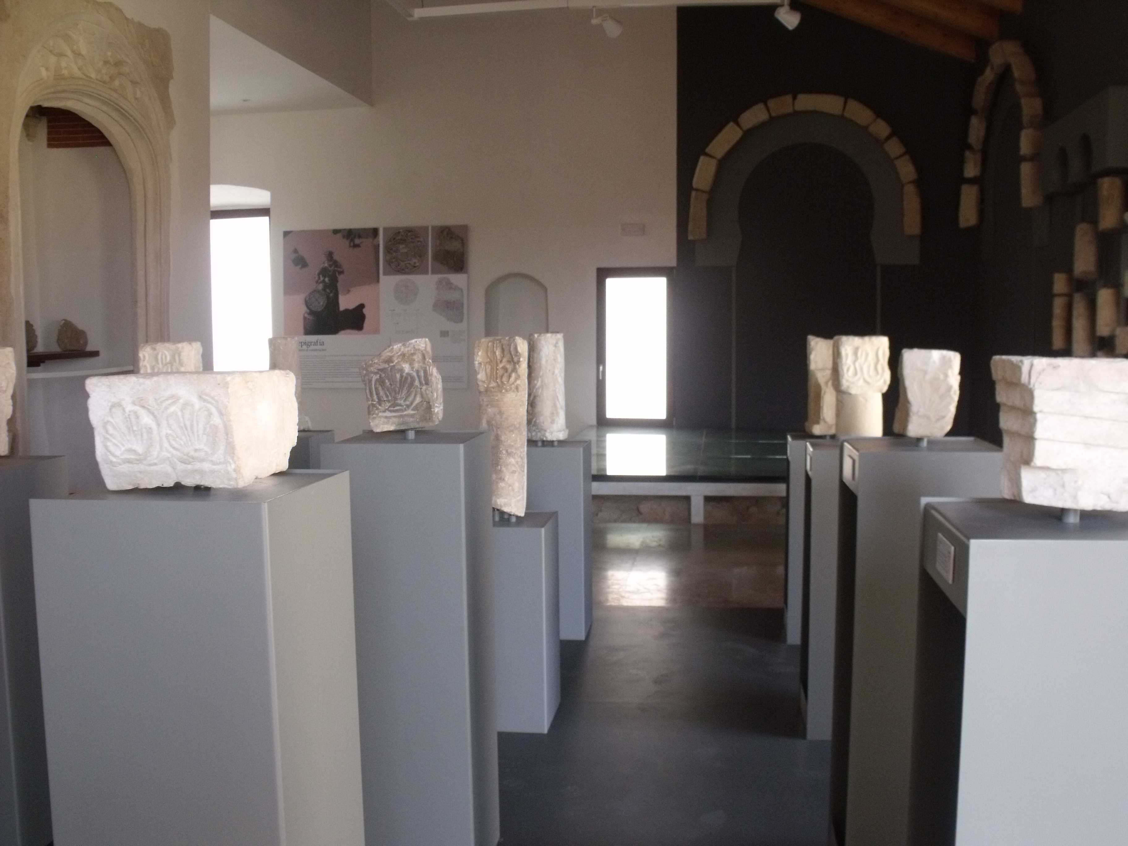 Detalle exposición Museo visigodo Pla de Nadal, en el interior de una de las salas del castillo.